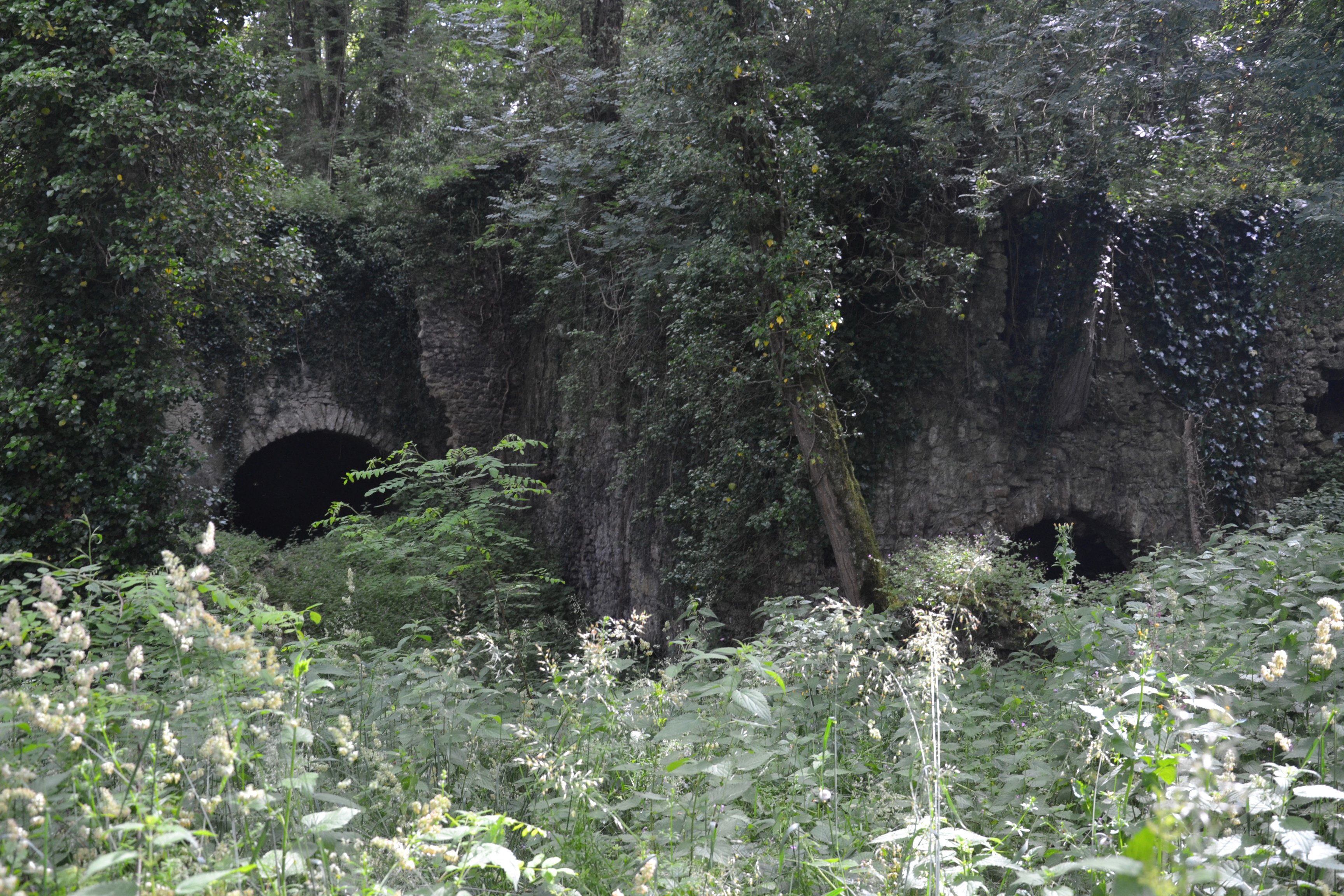 Anciennes forges de Queille, commune de Saint-Quentin-la-Tour (Ariège, France).